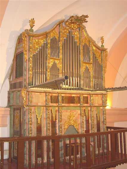 Órgano Histórico de Torre de Juan Abad